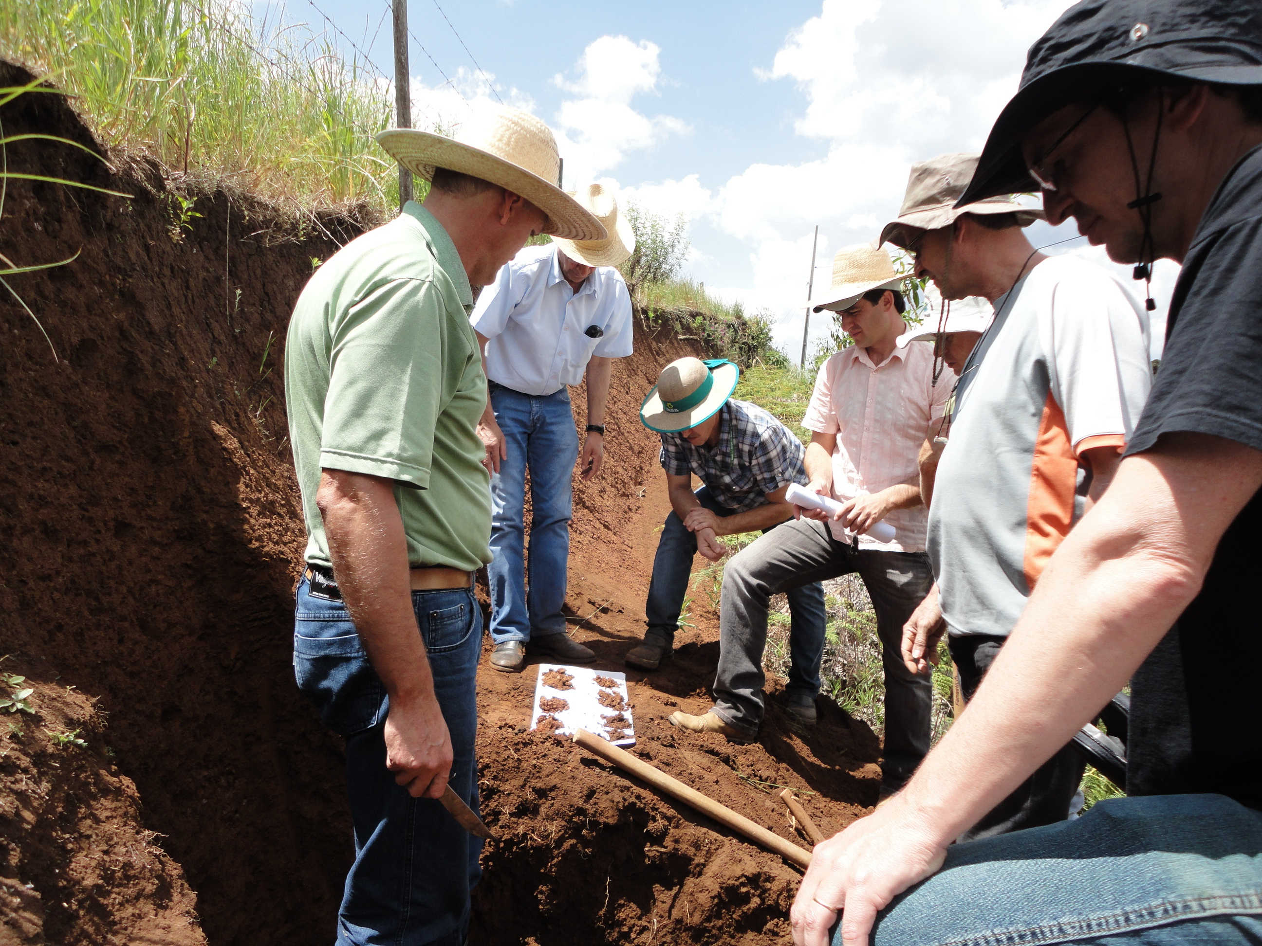 Ordenamento Ambiental - Epagri/Ciram